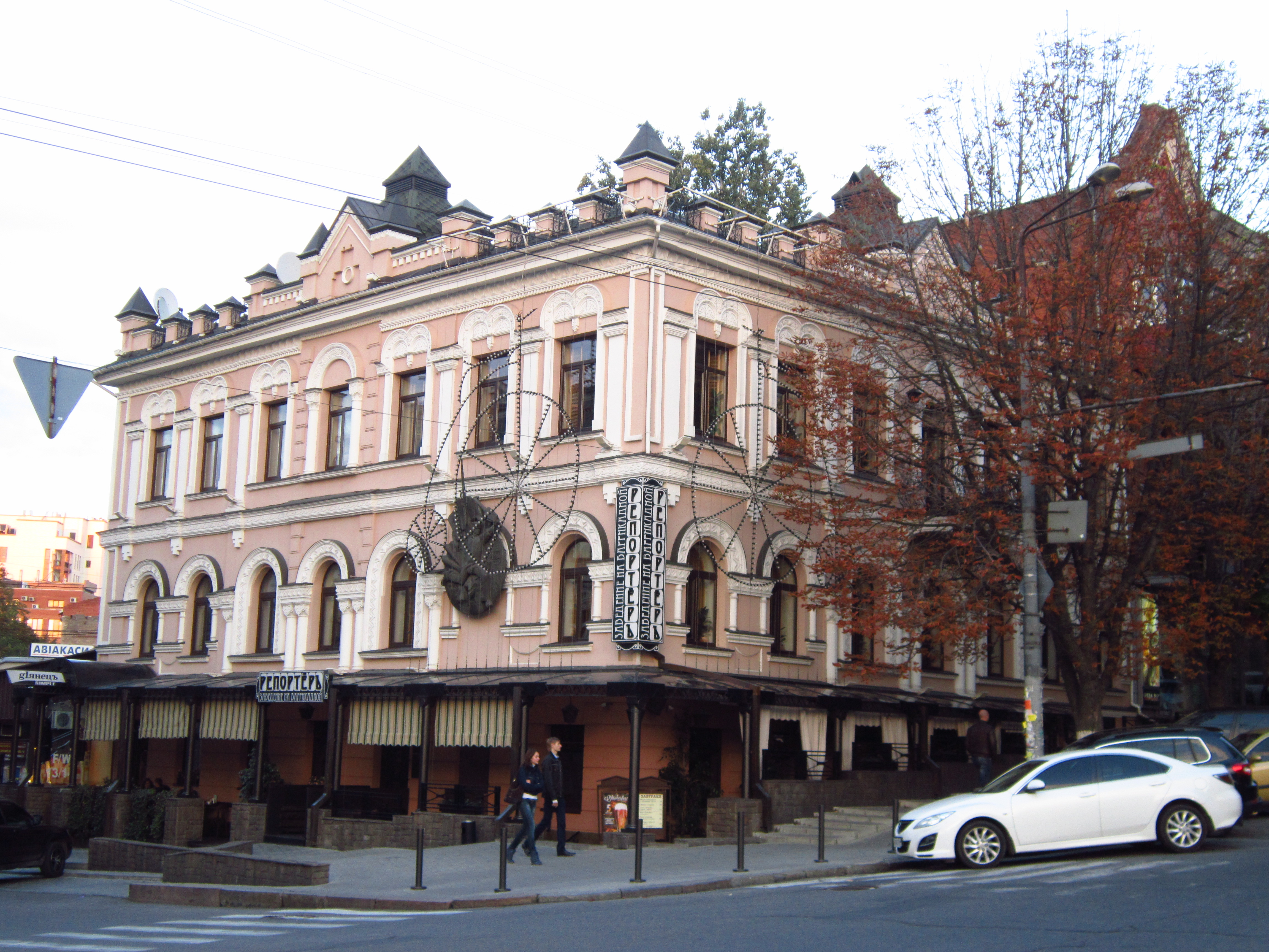 Доходний будинок, Дніпропетровськ, Барикадна вул., 2, корпус 1